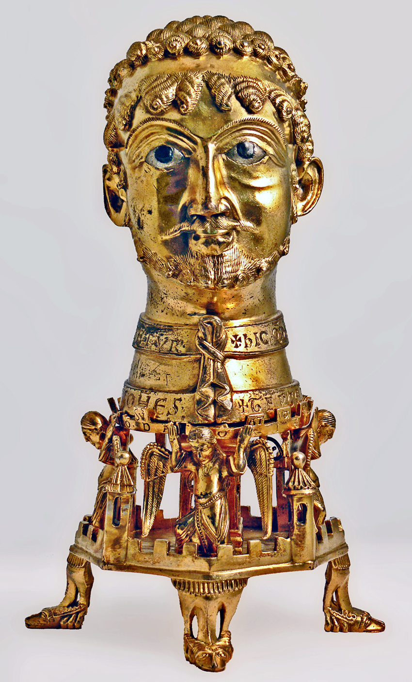 Portraitbüste des Kaisers Friedrich I., genannt Barbarossa (um 1160) ehem. Prämonstratenser-Chorherrenstift Cappenberg, heute: Kath. Pfarrgemeinde St. Johannes Evangelist, 59379 Selm